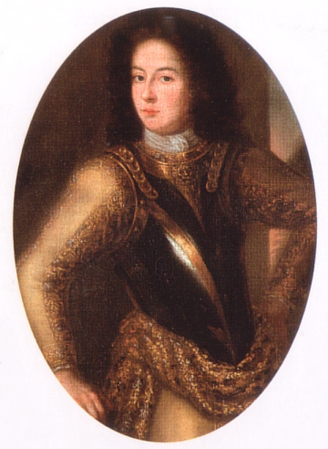 Philippe Christophe comte de Kœnigsmark assassiné en 1694 par La comtesse de Platen.